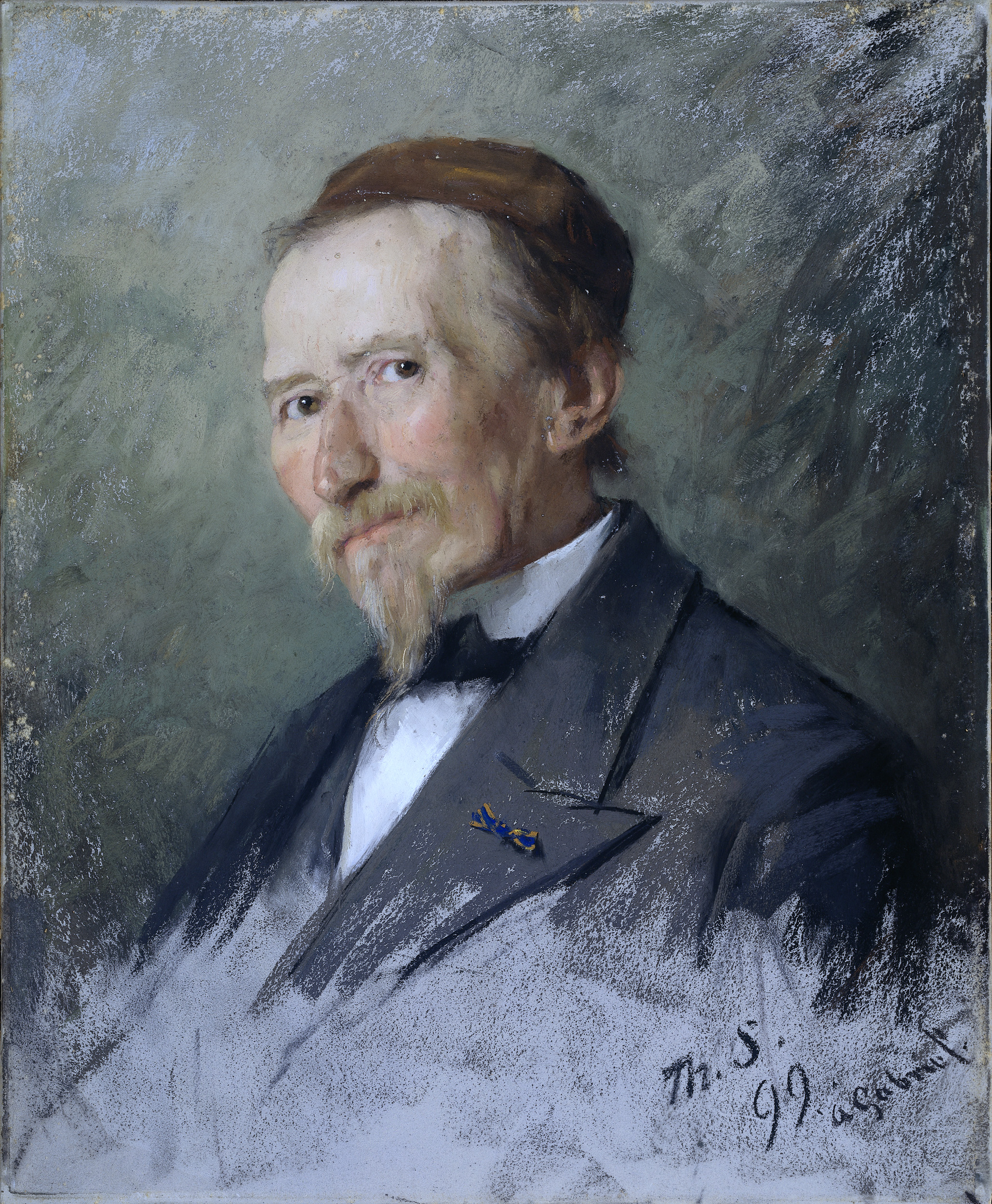 Paul Joseph Constantin Gabriël. pastel on papermedium QS:P186,Q189085;P186,Q11472,P518,Q861259. 56 cm x 46 cm